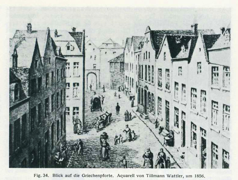 Griechenpforte Köln um 1856, Aquarell von Tillman Walter